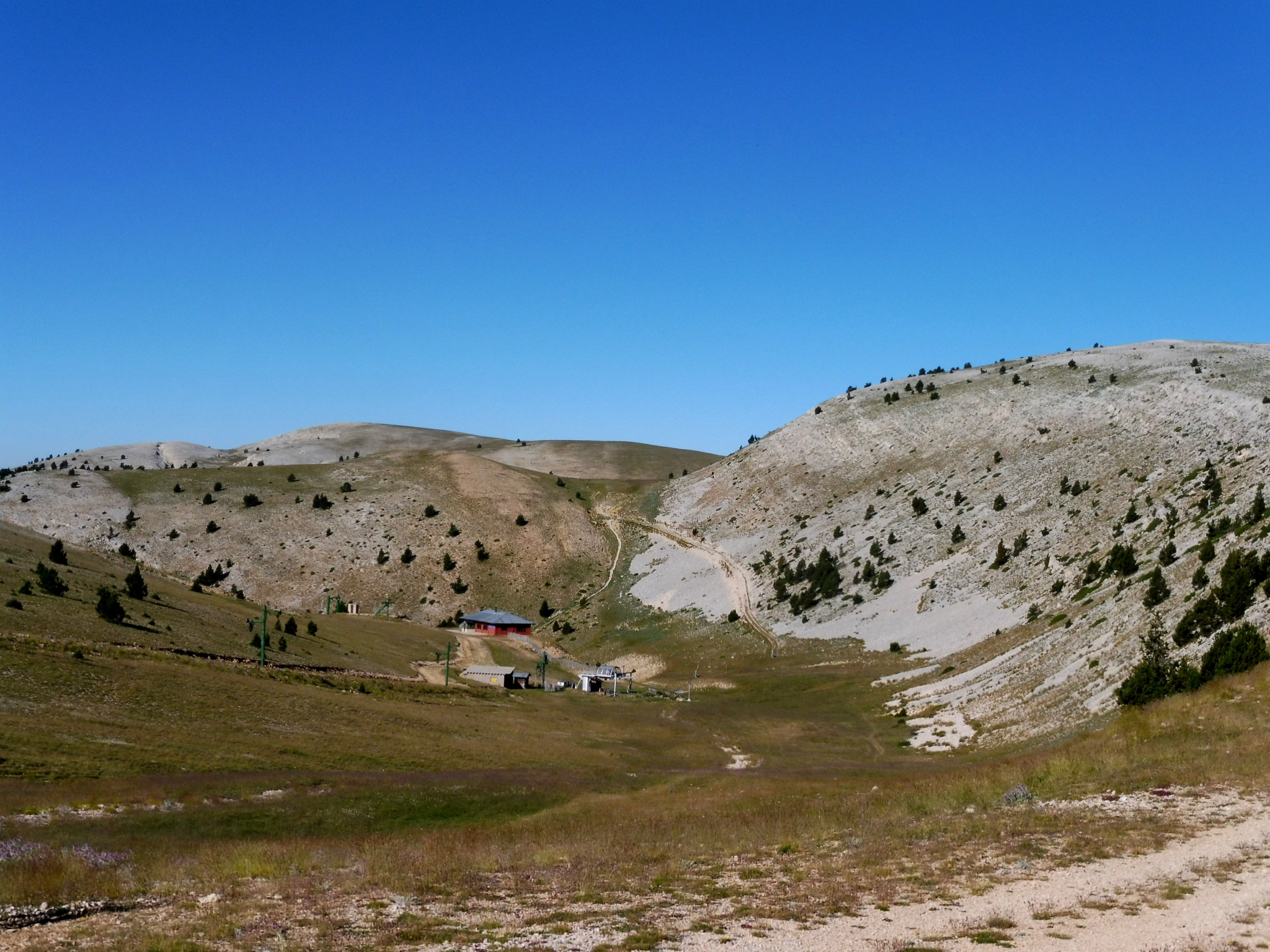 El Vulturó del Port del Comte des de la capçalera de la rasa de la Costa del Tabac. La Coma i la Pedra (Solsonès)